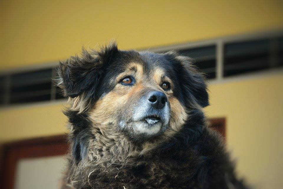 Mascota de la Universidad Nacional Mayor de San Marcos conocida como "Perrovaca".